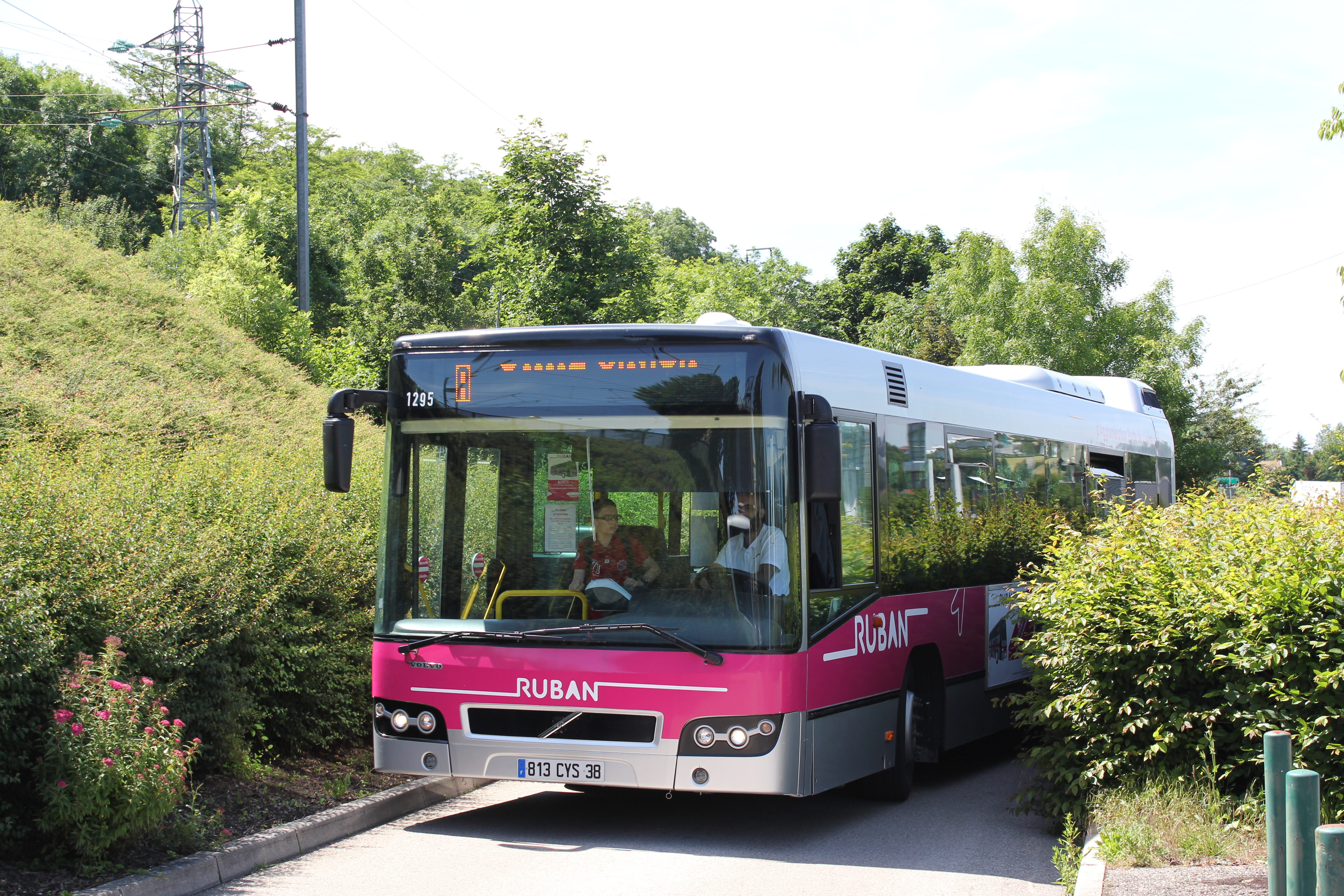 Volvo 7700 n°1295 du réseau Ruban